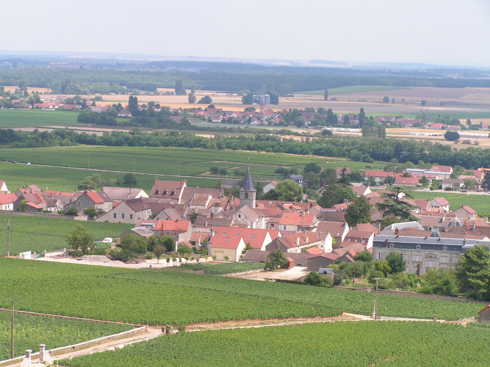 Vosne-Romanée, célèbre petit village vinicole de la Côte de Nuits (région de la Côte d'Or en Bourgogne - France)